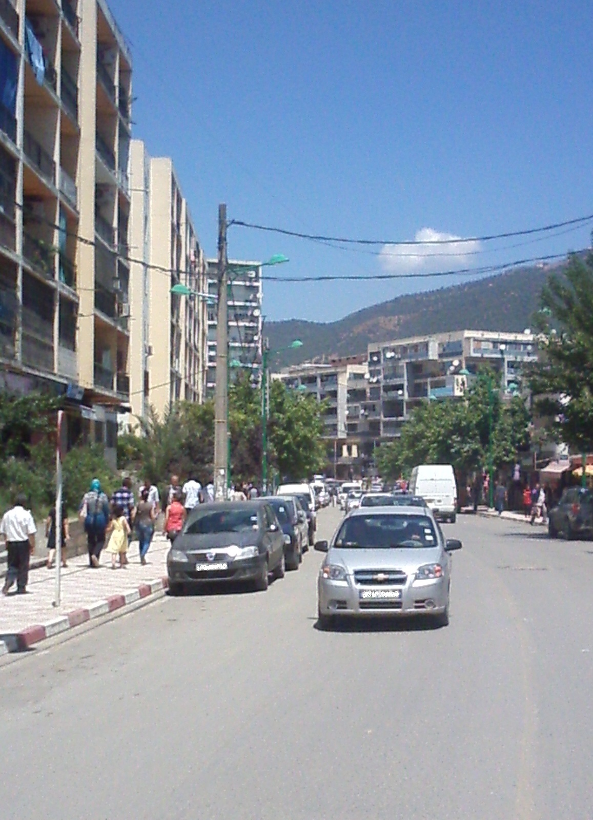 La rue Lamali Ahmed en plein cœur de la ville Tizi Ouzou, menant vers le CHU Nedir Mohamed et le stade du 1er Novembre 1954, la cité les genêts étant à gauche et les fameux bâtiments bleus en face.